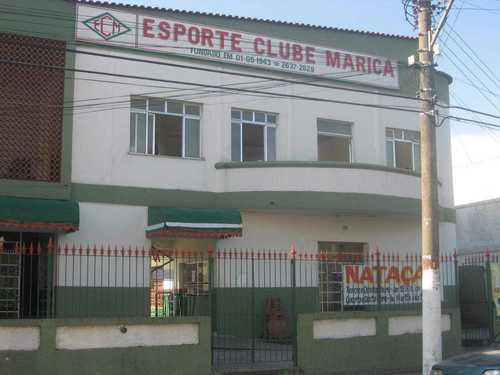 Sede do Esporte Clube Maricá, localizada na cidade de Maricá, estado do Rio de Janeiro, Brasil.